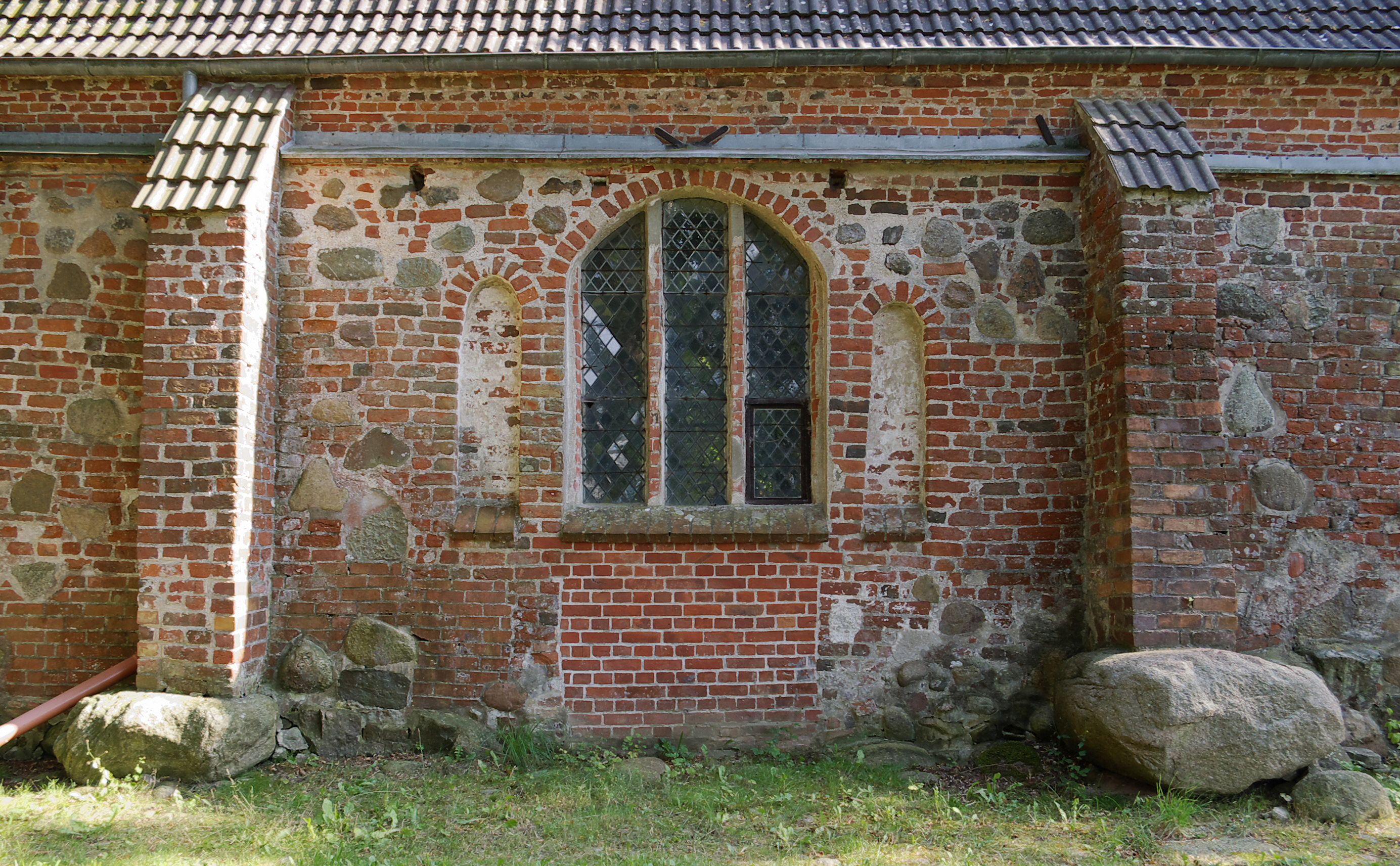 St. Stephanus-Kirche Swantow, Rügen. Detail Kirchenschiff Nordseite. Typisch: Feldsteine nicht nur im Fundament, sondern im ganzen Wandbereich verwendet